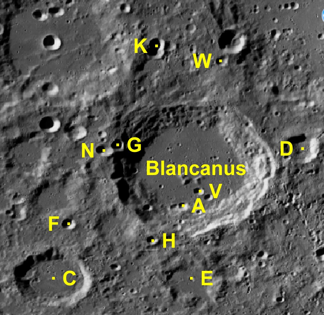 Cráter lunar Blancanus. Cráteres satélite. (Imagen LRO)